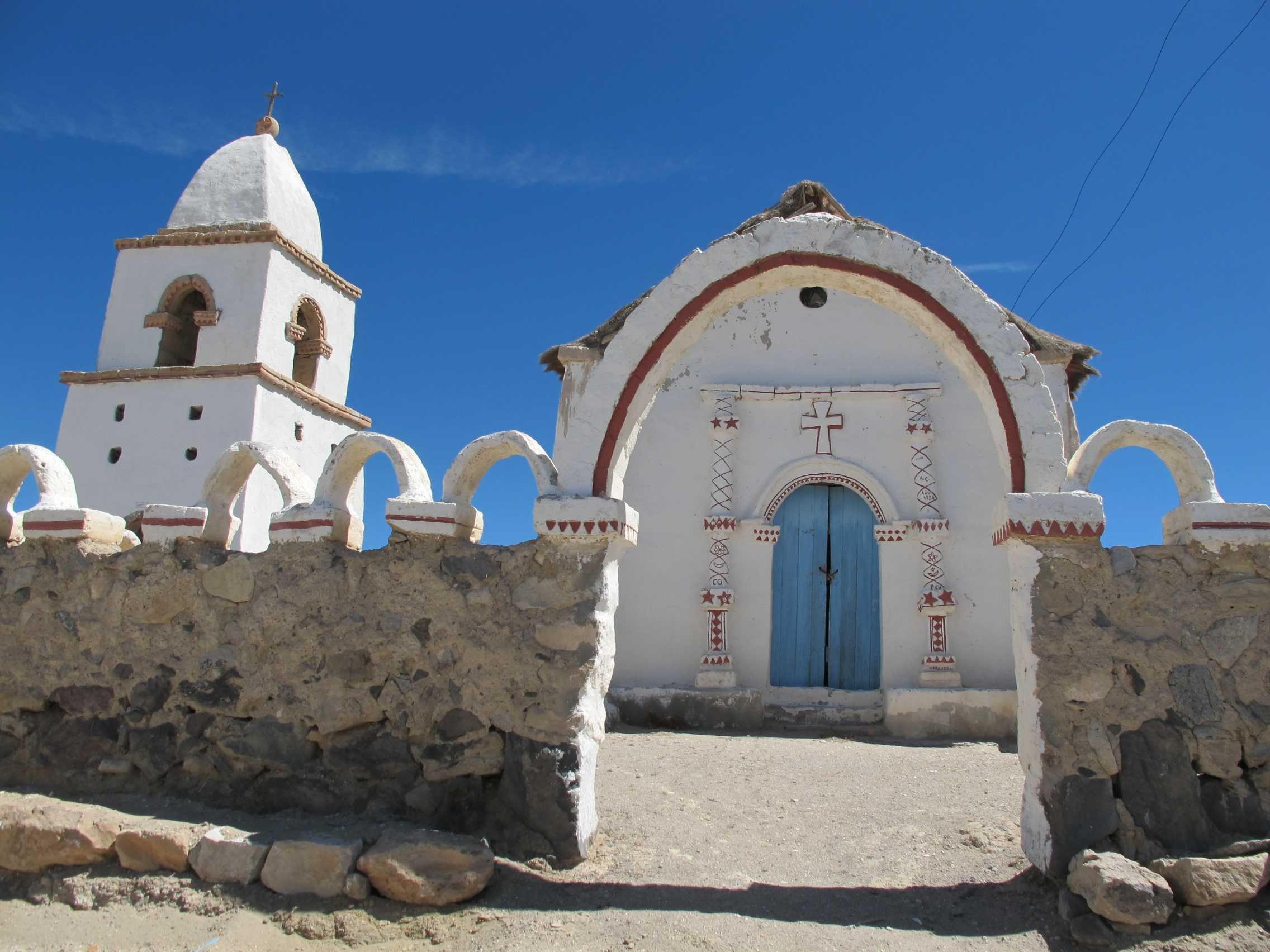 Iglesia de Cotasaya This is a photo of a national monument in Chile: 997